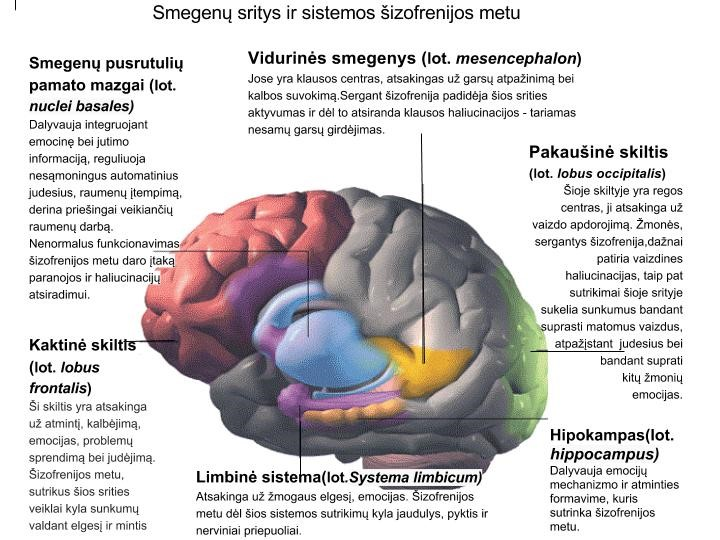 Smegenų sritys ir sistemos šizofrenijos metu